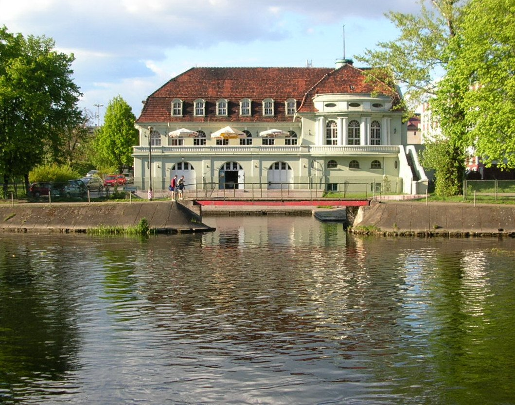 Pałacyk Bydgoskiego Towarzystwa Wioślarskiego, od 1996 r. restauracja chińska i hotel w Bydgoszczy